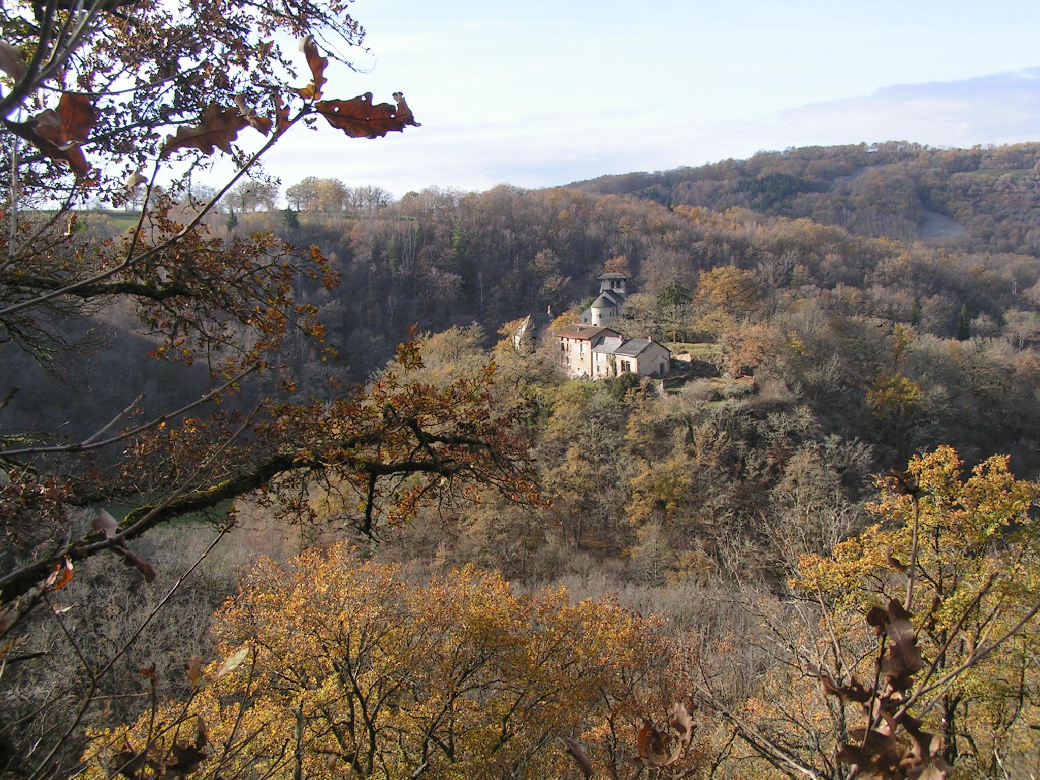 village de Saint Victor (Cantal), vu d'Aleix